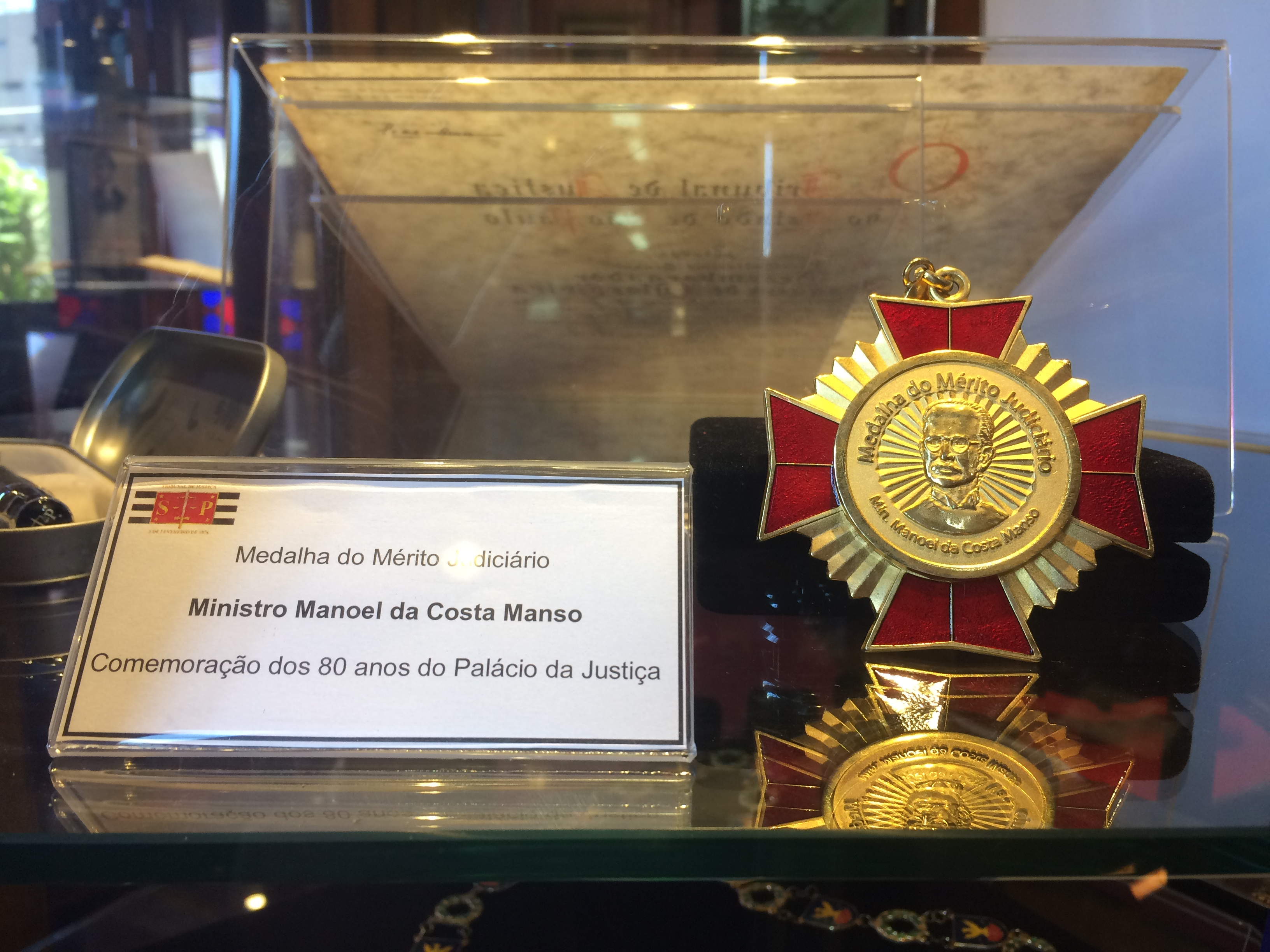 Entrada do museu.